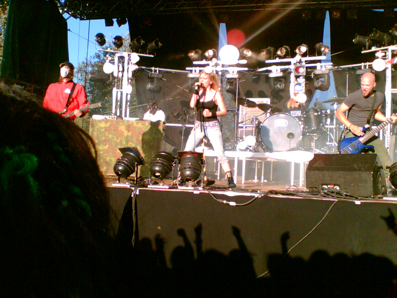 Velcra in Qstock 2005